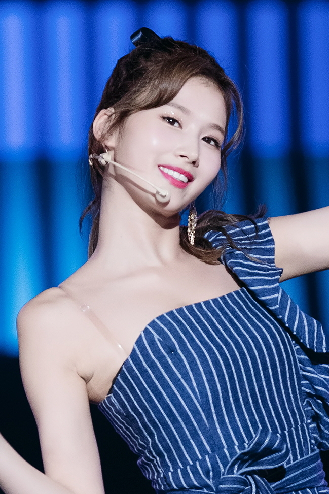 180717 열린음악회 트와이스